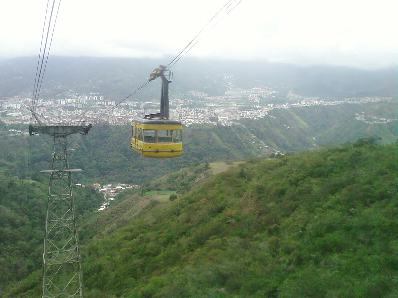 Mérida